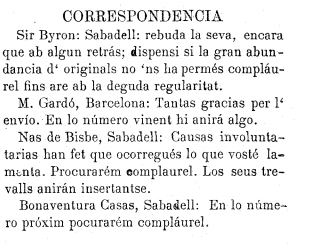 Indicava continuació l'últim numero de Lo Torronyau